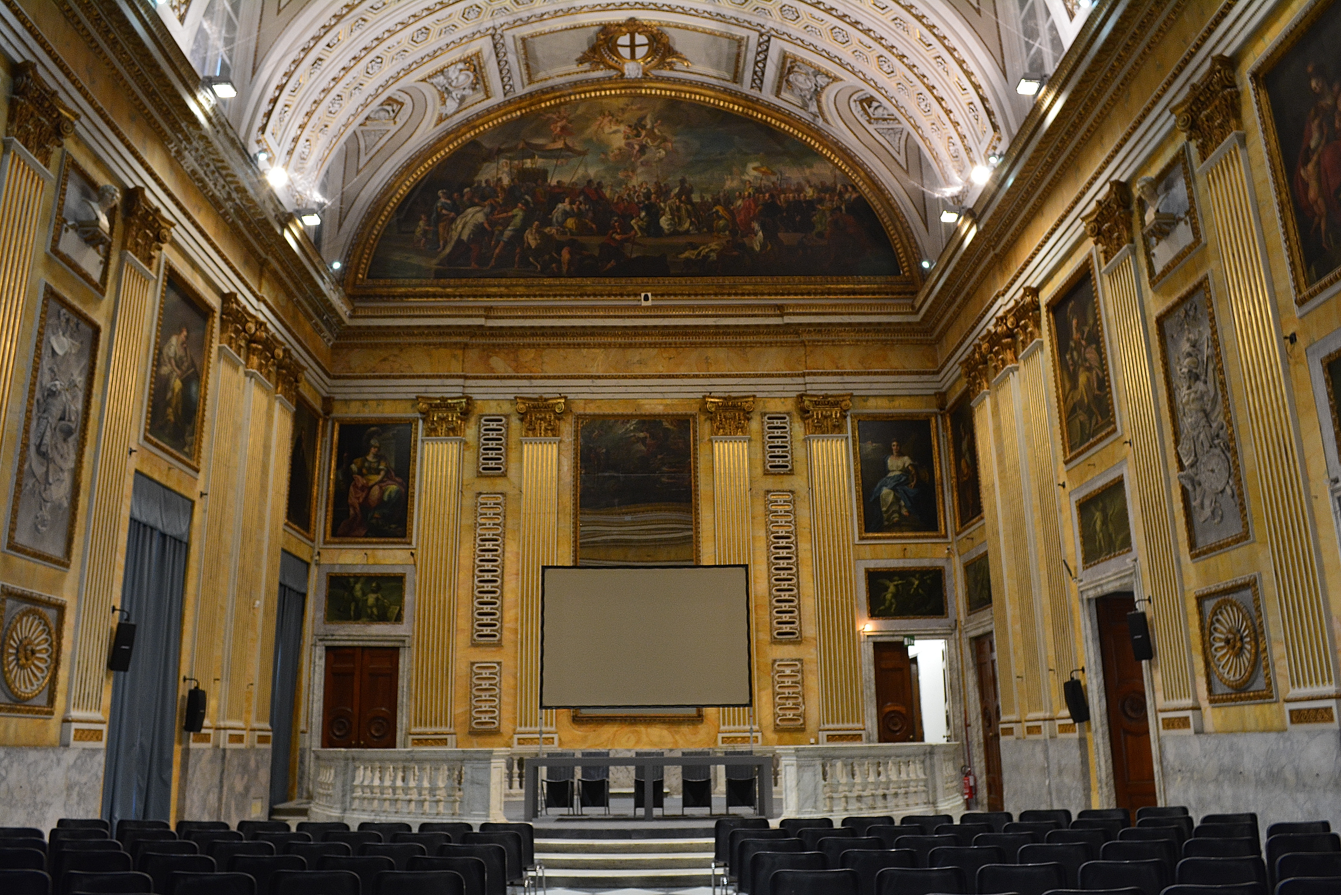 Palazzo Ducale di Genova This is a photo of a monument which is part of cultural heritage of Italy.